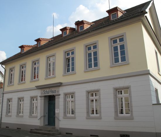 Worms-Horchheim Ehemaliges Schulhaus (1828)